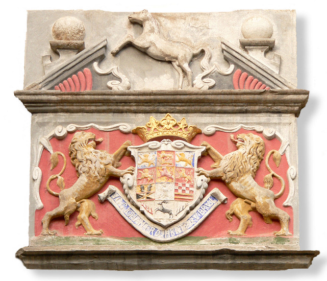 Wappen über Toreingang Schloss Herzberg